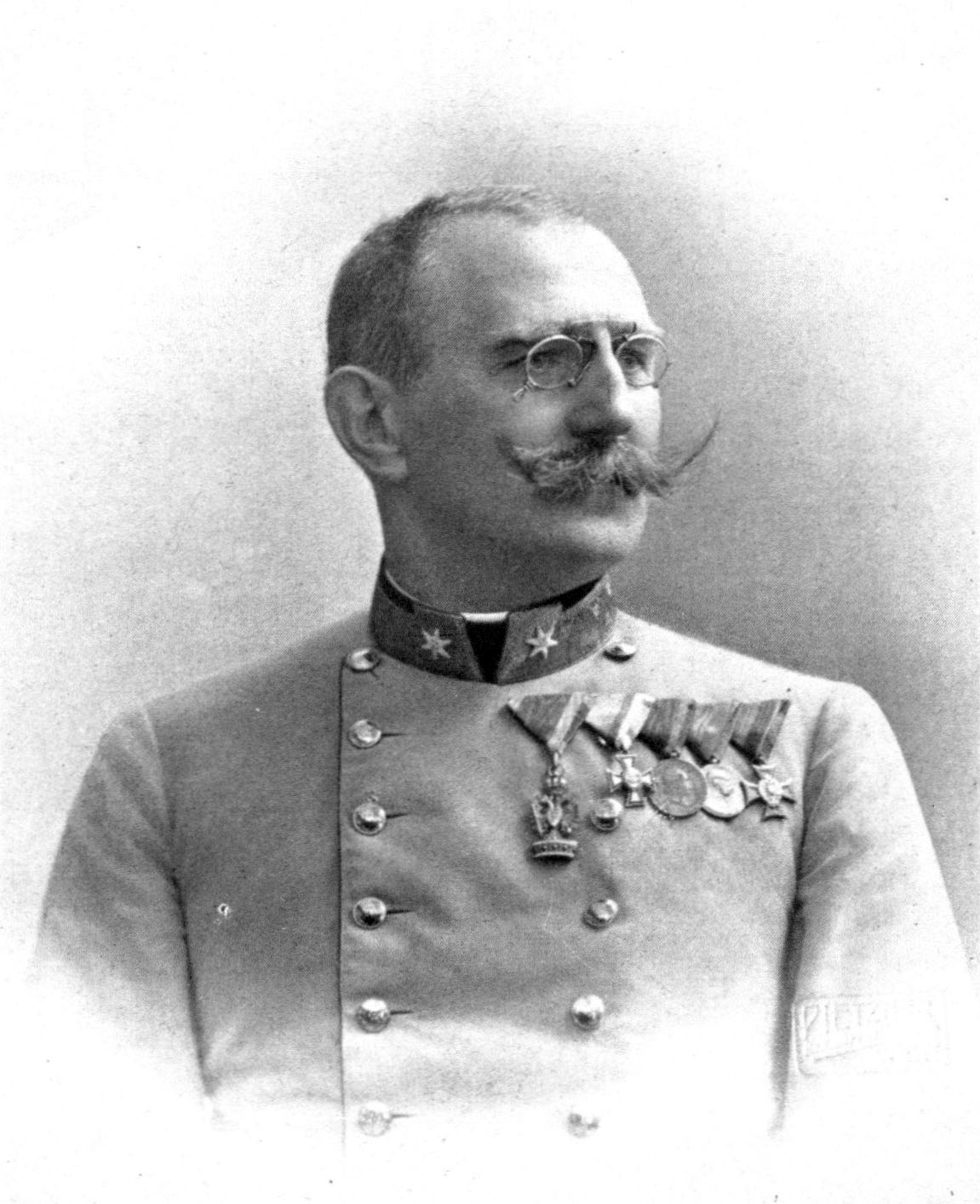 Johann Freiherr von Friedel (1856-1928), Austrian-Hungarian general